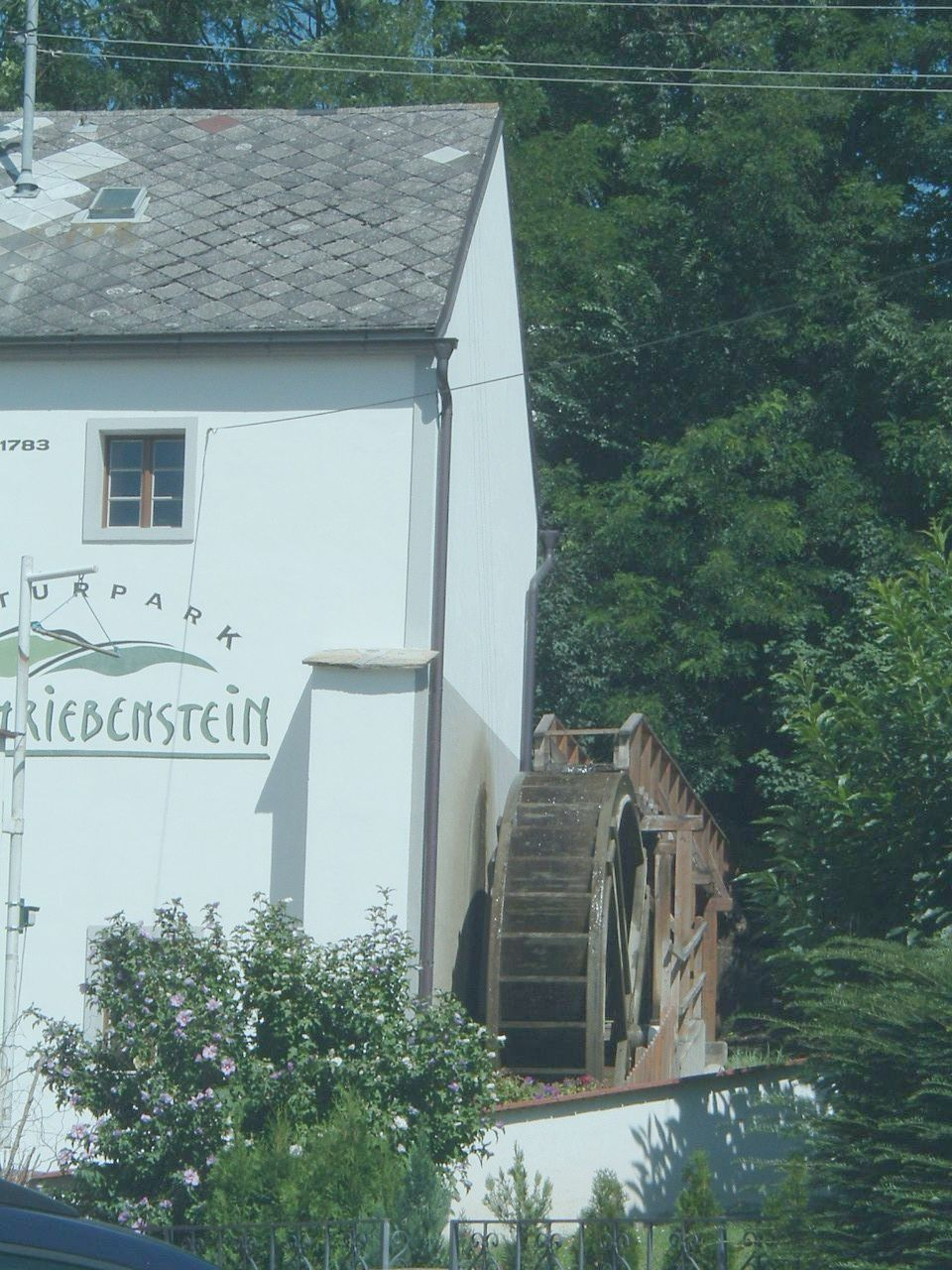 Water-mill in Markt Neuhodis, Burgenland, Austria